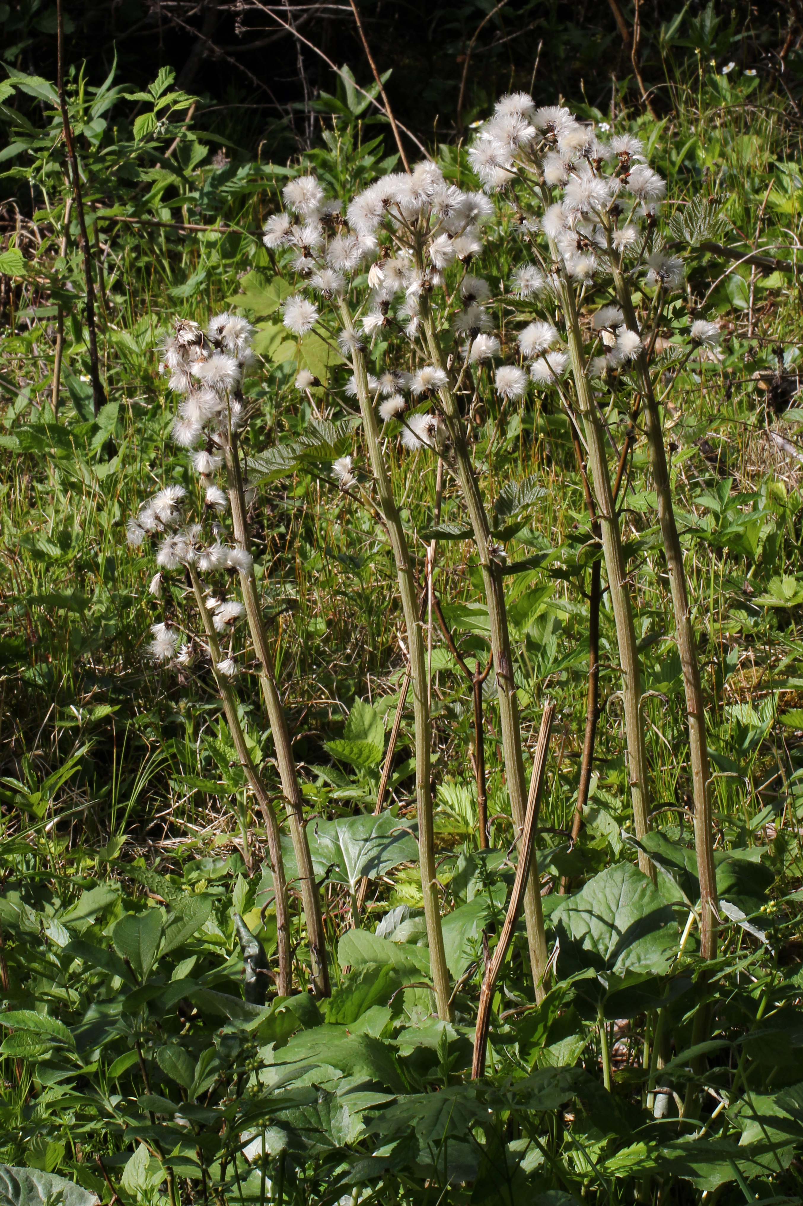 Reife Alpen-Pestwurz (Petasites paradoxus) im Nationalpark Gesäuse This file shows the National Park Gesäuse in Austria.